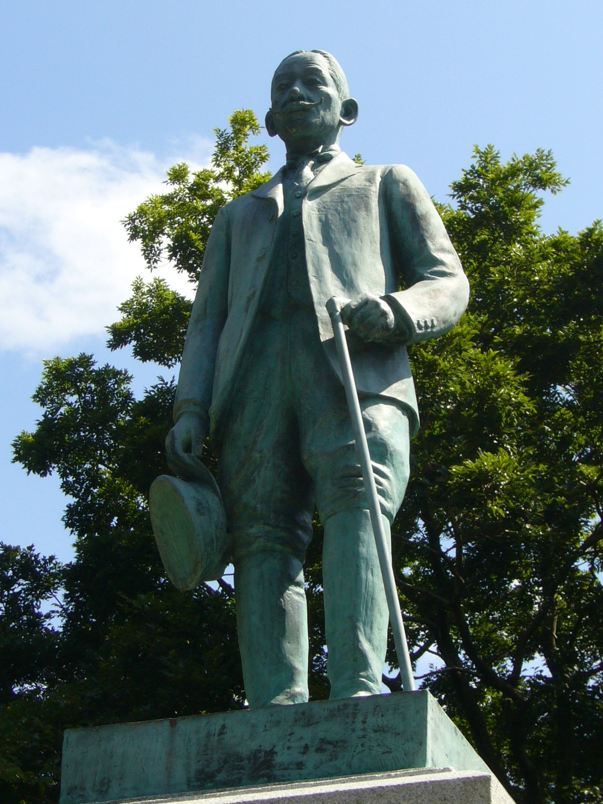 Monument-niiyama-sousuke,narita-city,japan